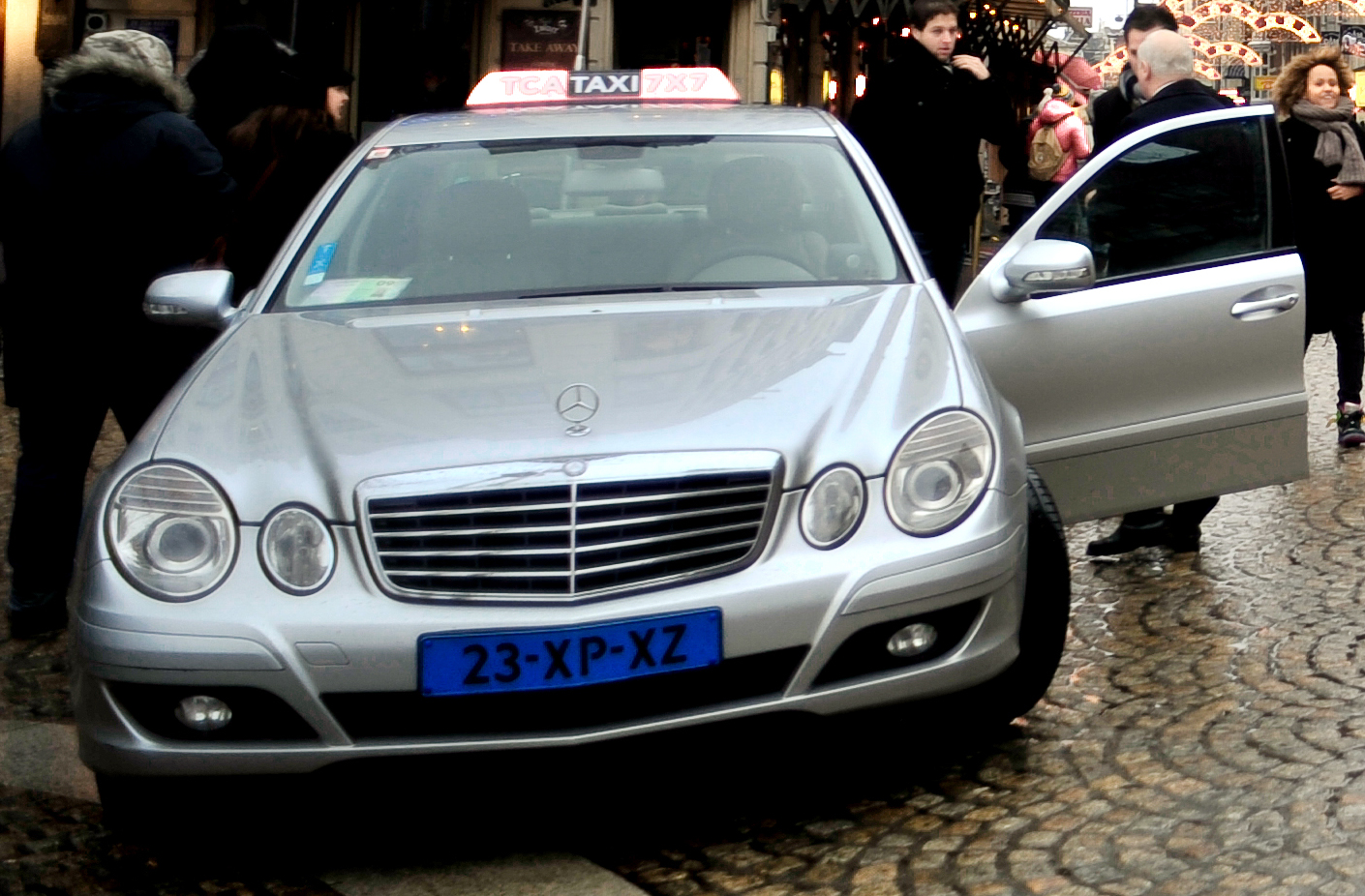 taxi